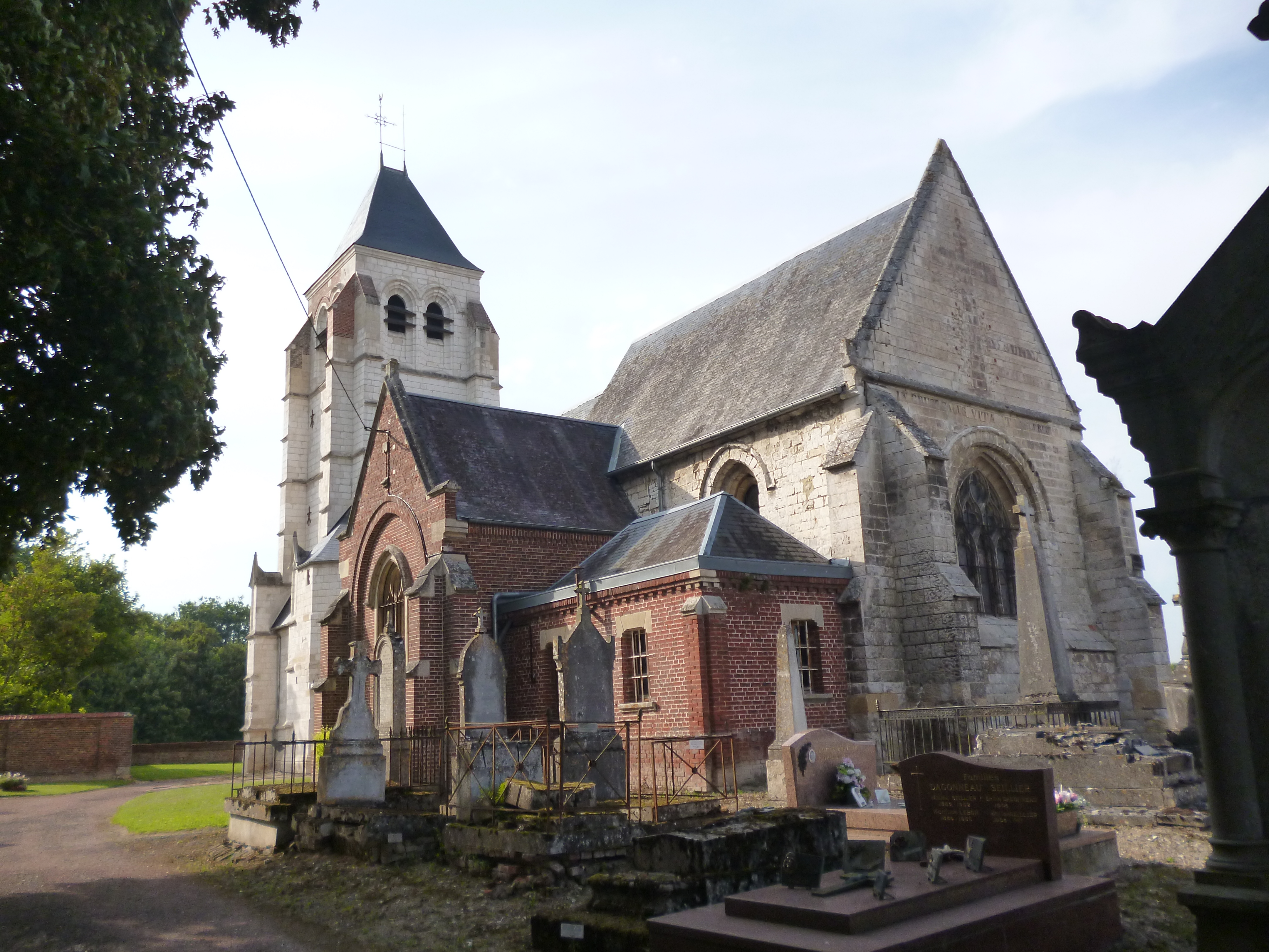 Eglise Saint-Martin de Vendeuil-Caply (Oise, Picardie). Inscription MH 1990.